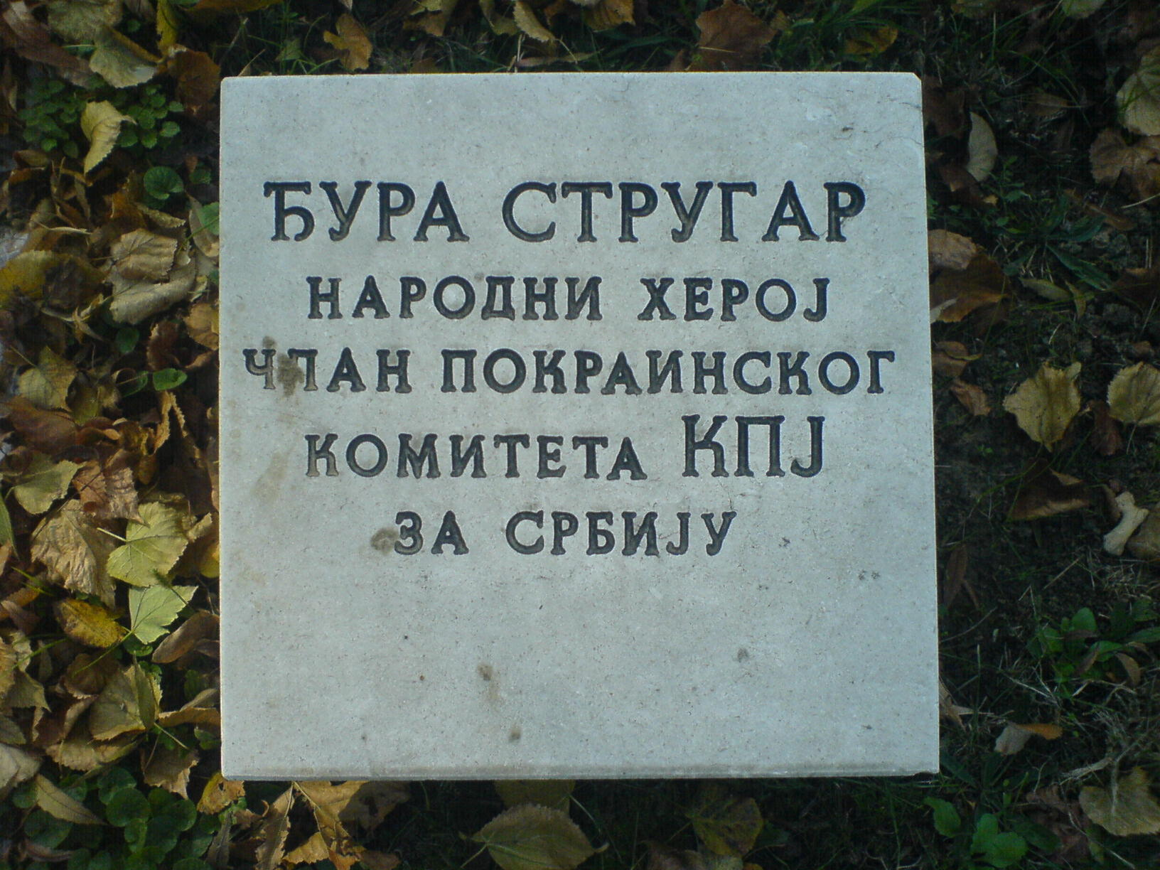 Grob Djure Strugara